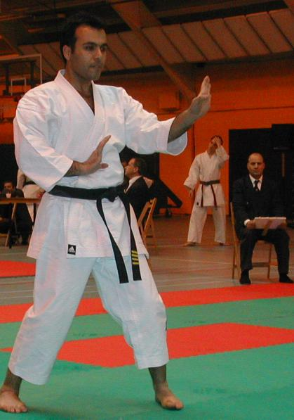 Auteur : Franck Duboisse